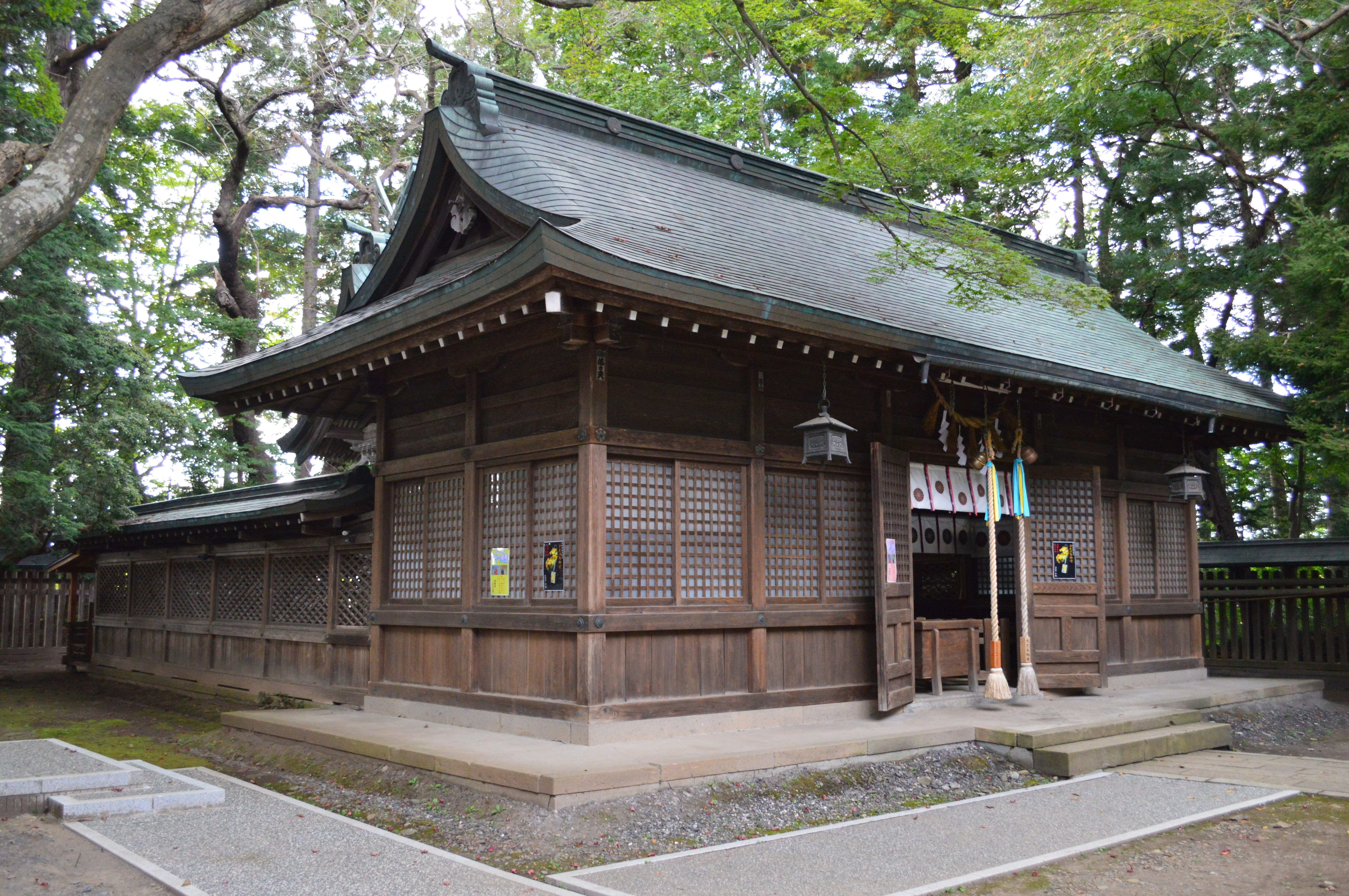 駒形神社 (奥州市) 境内鹽竈神社